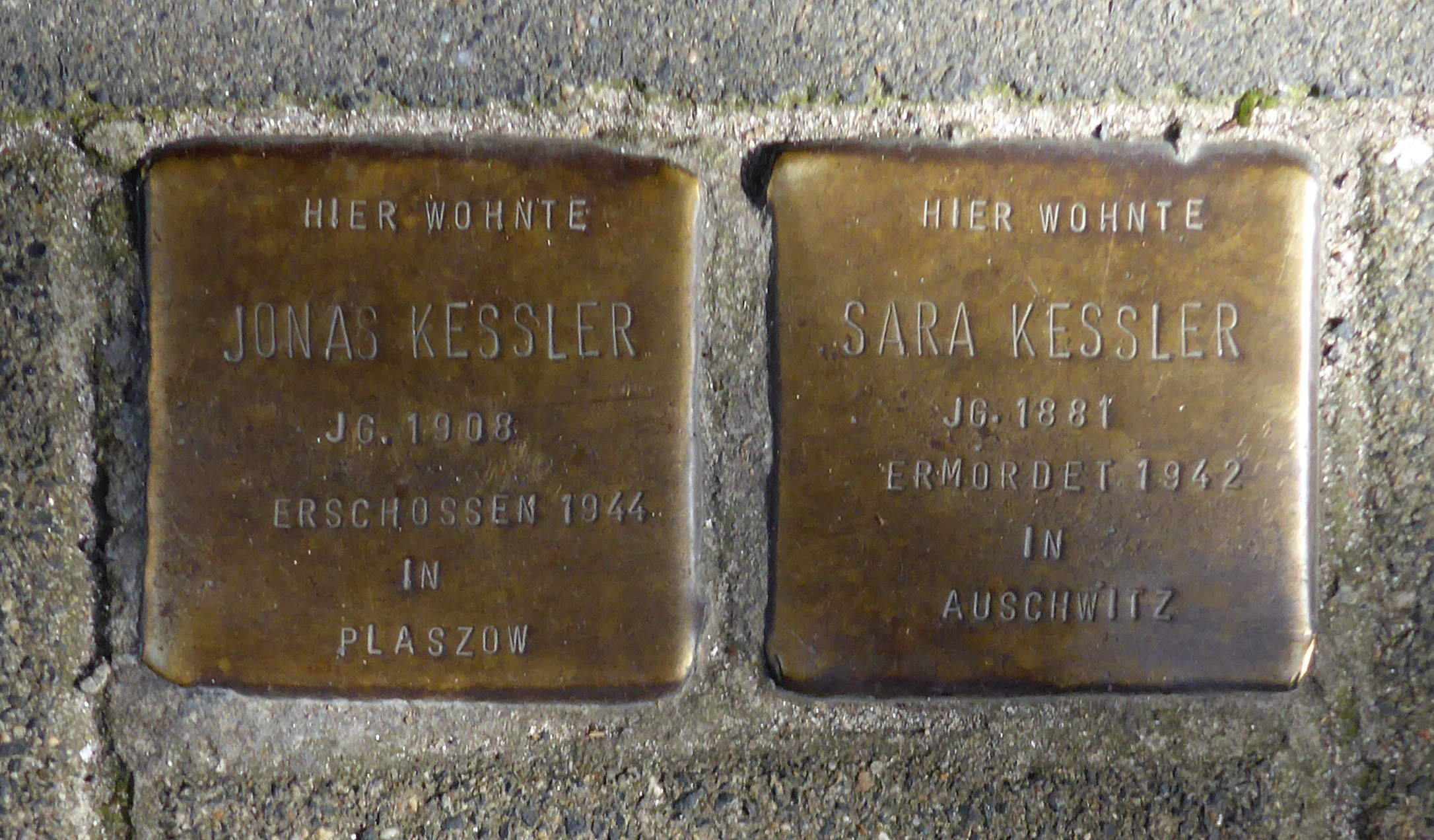 Stolperstein: Jonas und Sara Kessler (Kartäuserhof 8), Köln.